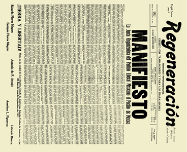 Regeneración (journal mexicain) - 23-11-1911